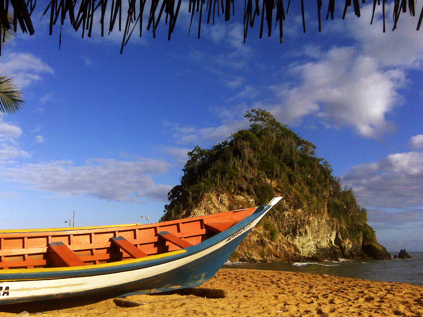 cerro en cuya cuspide hay un arbol llamado copey en la poblacion del mismo nombre